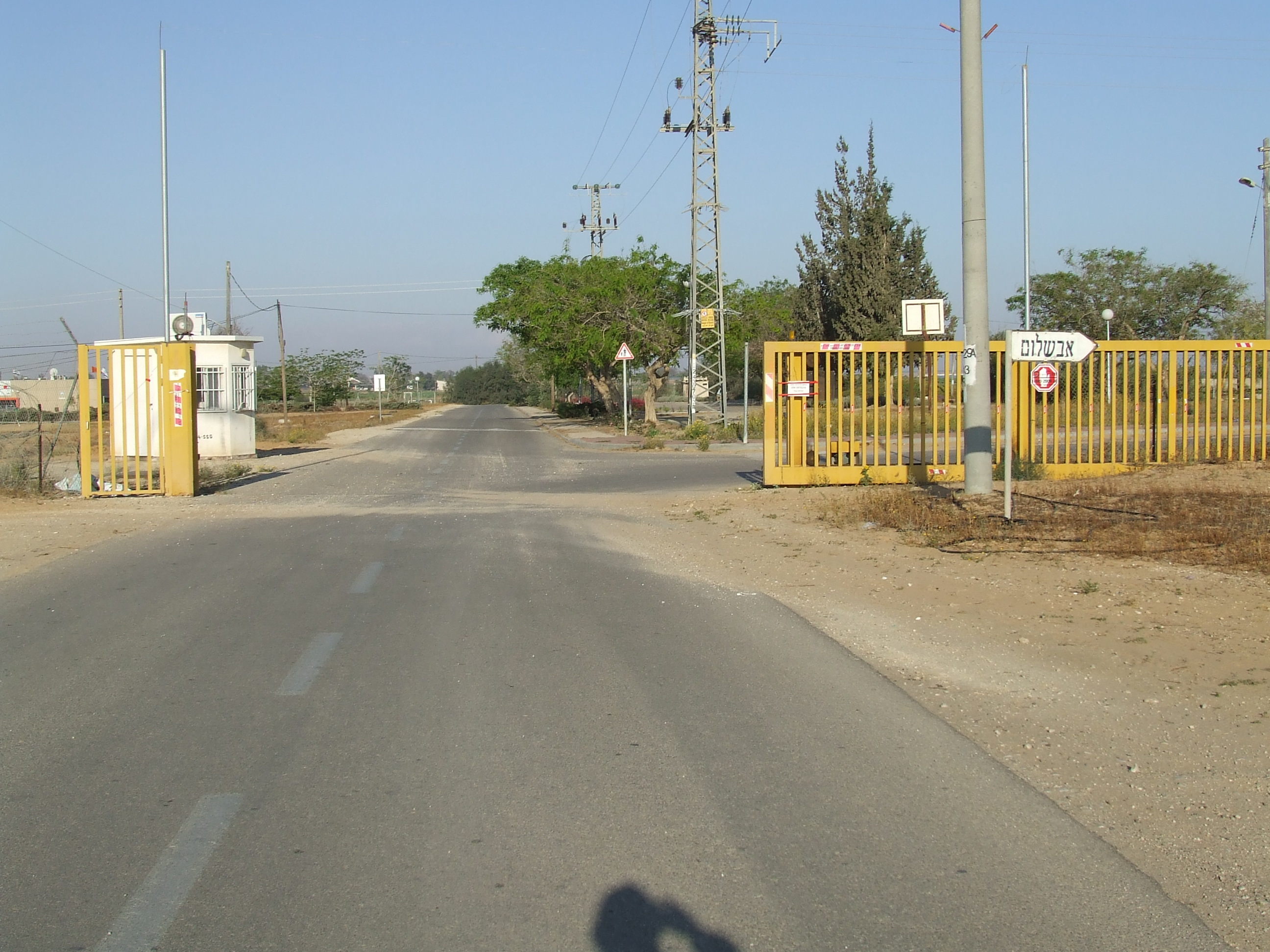 כניסה לישוב